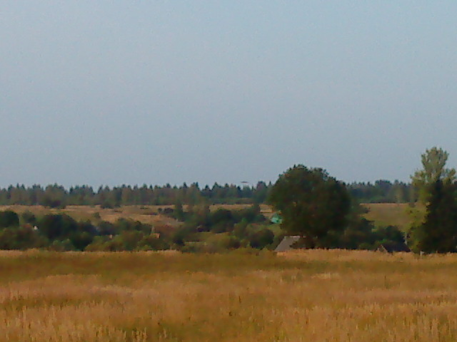 окрестные поля Новослободска